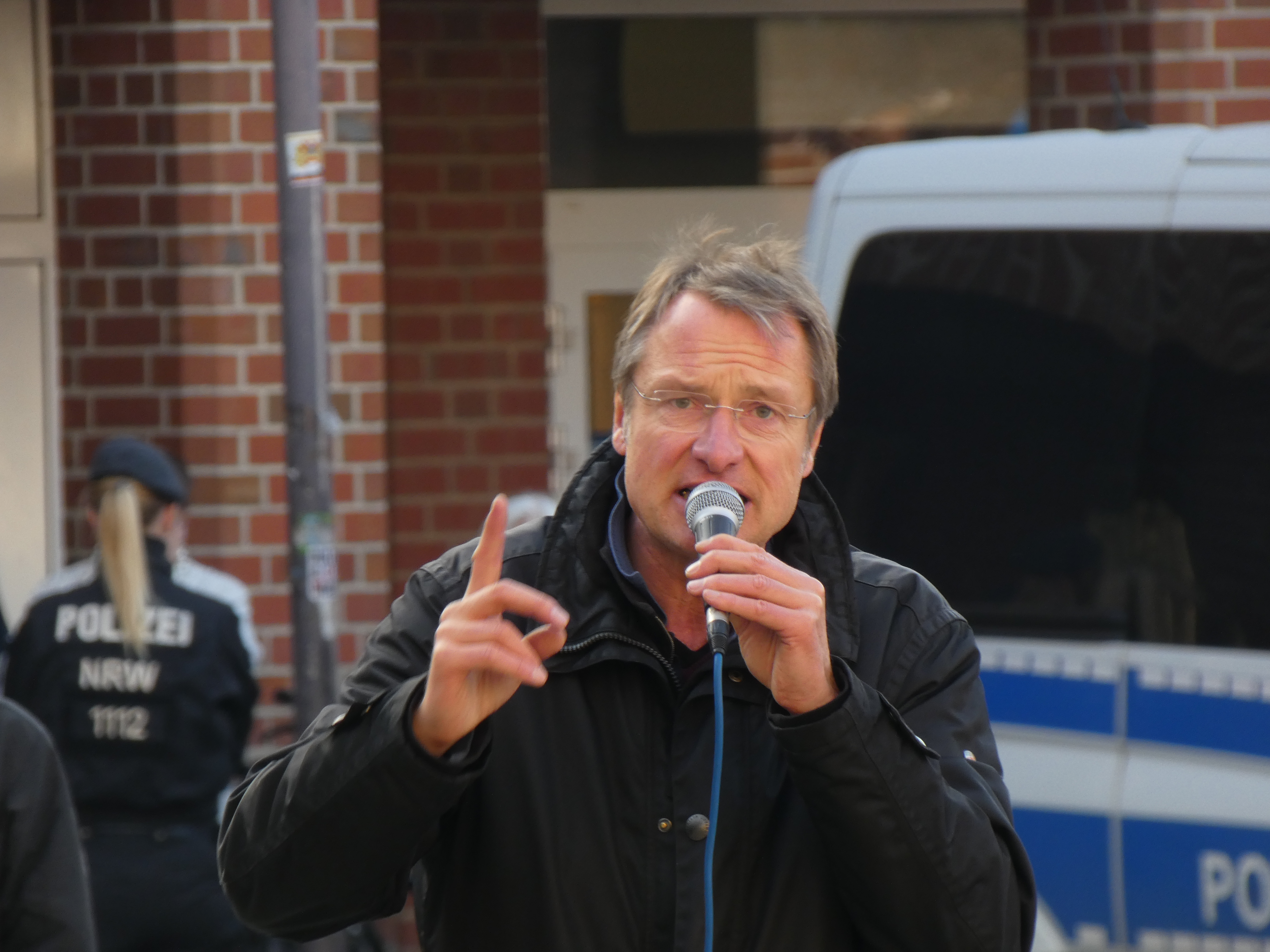 Michael Stürzenberger 2018